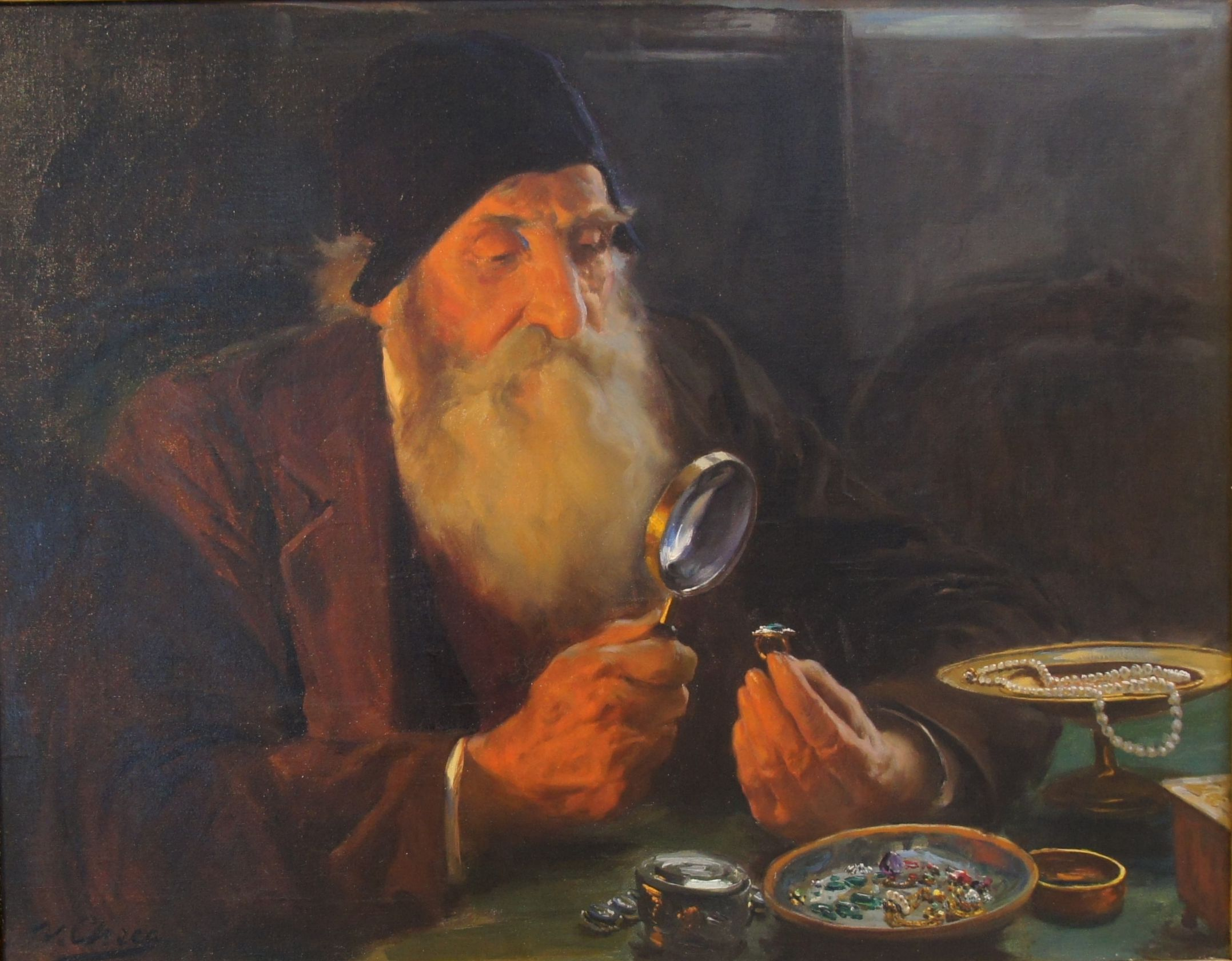 El anticuario, óleo sobre lienzo, 62,7 x 79,6 cm. 1908. Academia Druet, Argelia. Firmado ángulo inferior izquierdo. Esta obra pertenece a una de las más notables de Checa. Utilizando el mismo modelo, se conocen varias versiones, en la que el anciano, tiene en sus manos un libro, o una copa o comparte escena con un joven. Probablemente Checa agrupaba en sus exposiciones las diferentes facetas del "Fausto" humano, con su peculiar tocado, como relata W. Smith en su crónica artística de Le Mondain en la galería Georges Petit (9 de febrero de 1895): "... un magnífico retrato de un anciano haciendo "pendant" a un Fausto leyendo, de gran veracidad.". Donación de los hijos del pintor.